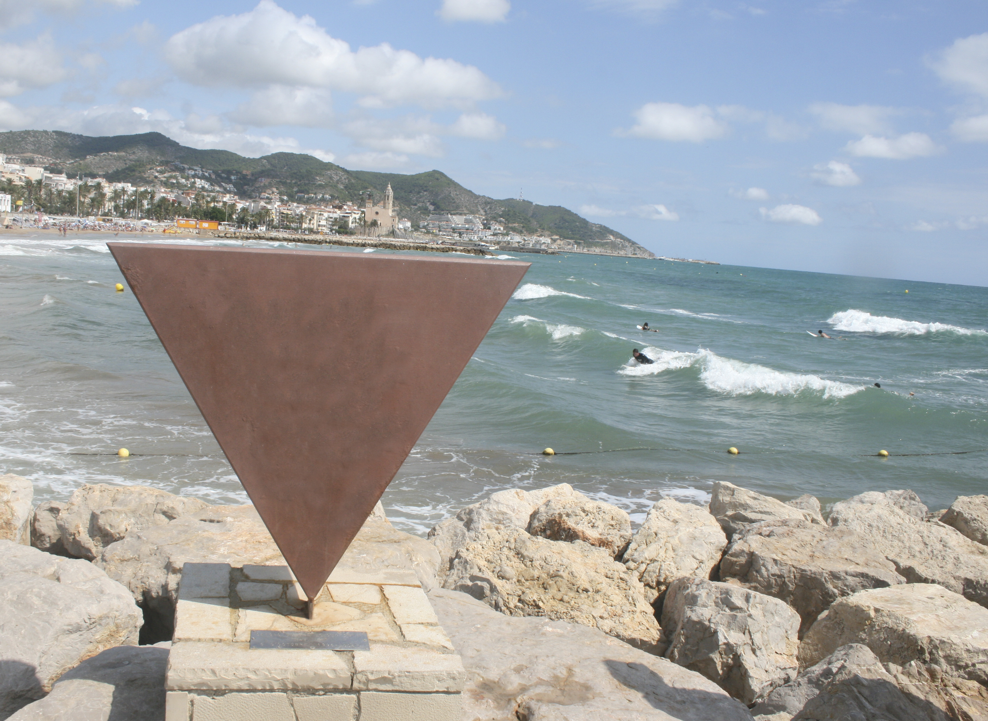 Памятник против гомофобии в Ситжесе